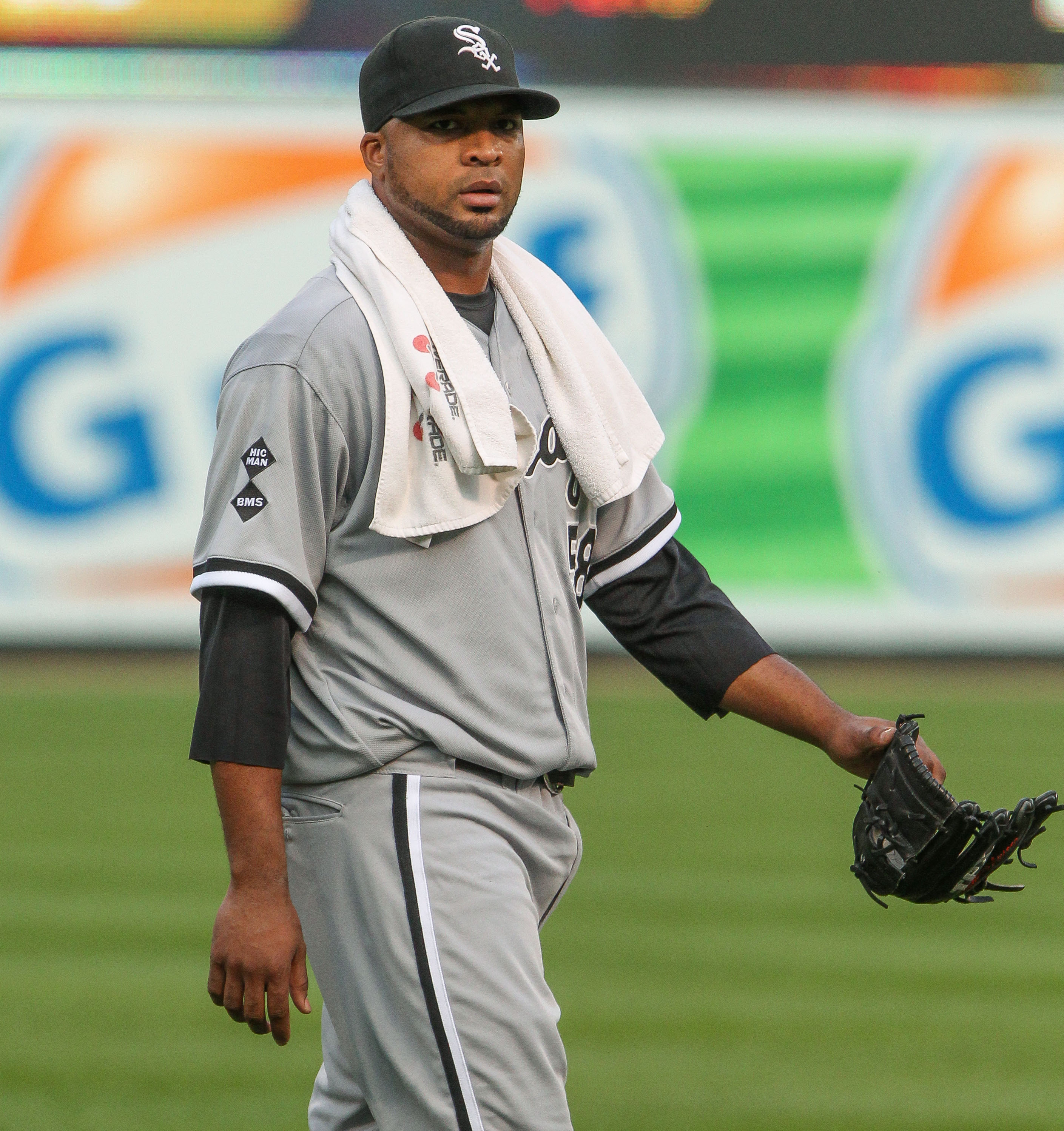 Francisco Liriano